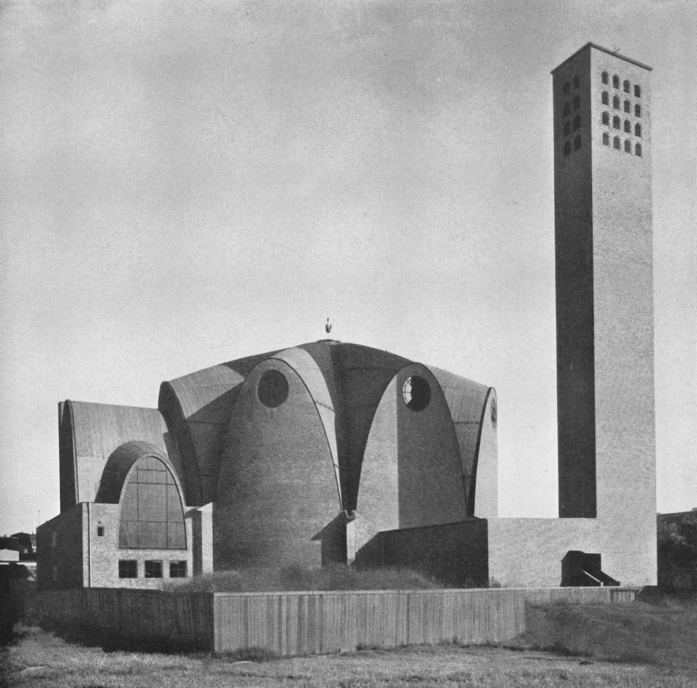 Kirche St. Engelbert, Köln-Riehl, erbaut 1930-1932. Architekt: Dominikus Böhm